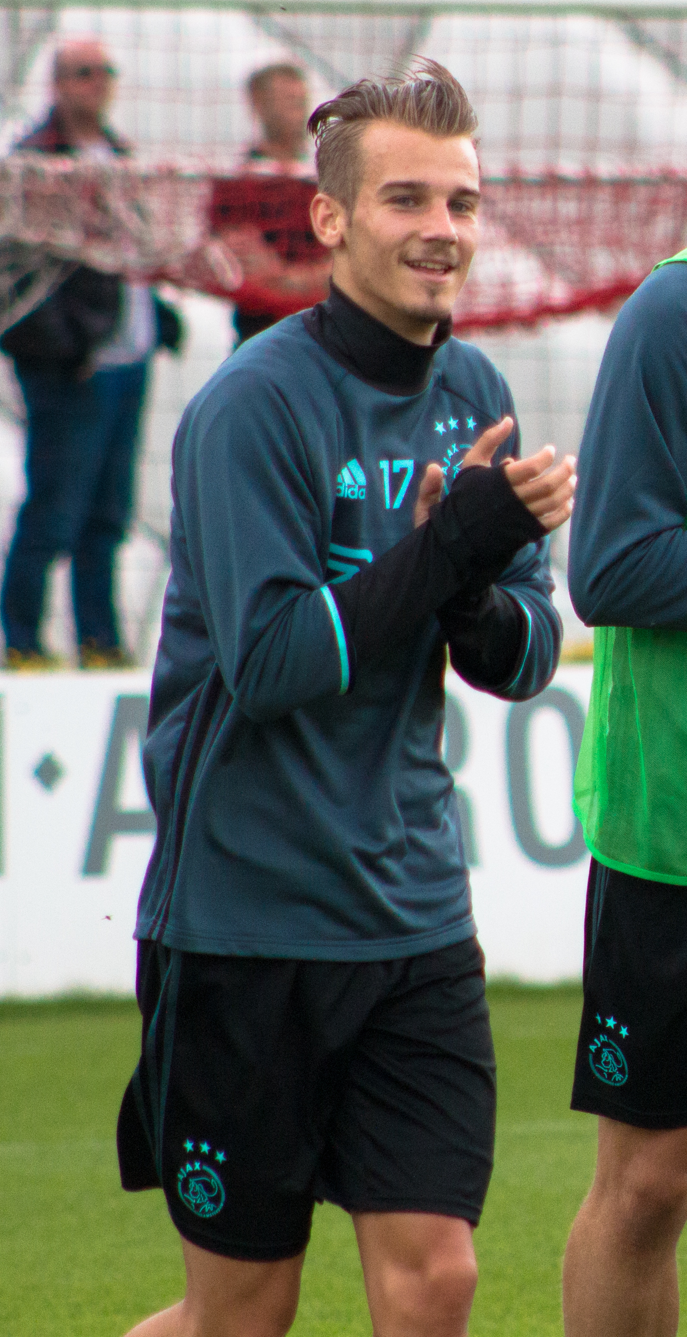 Ajax Open Training